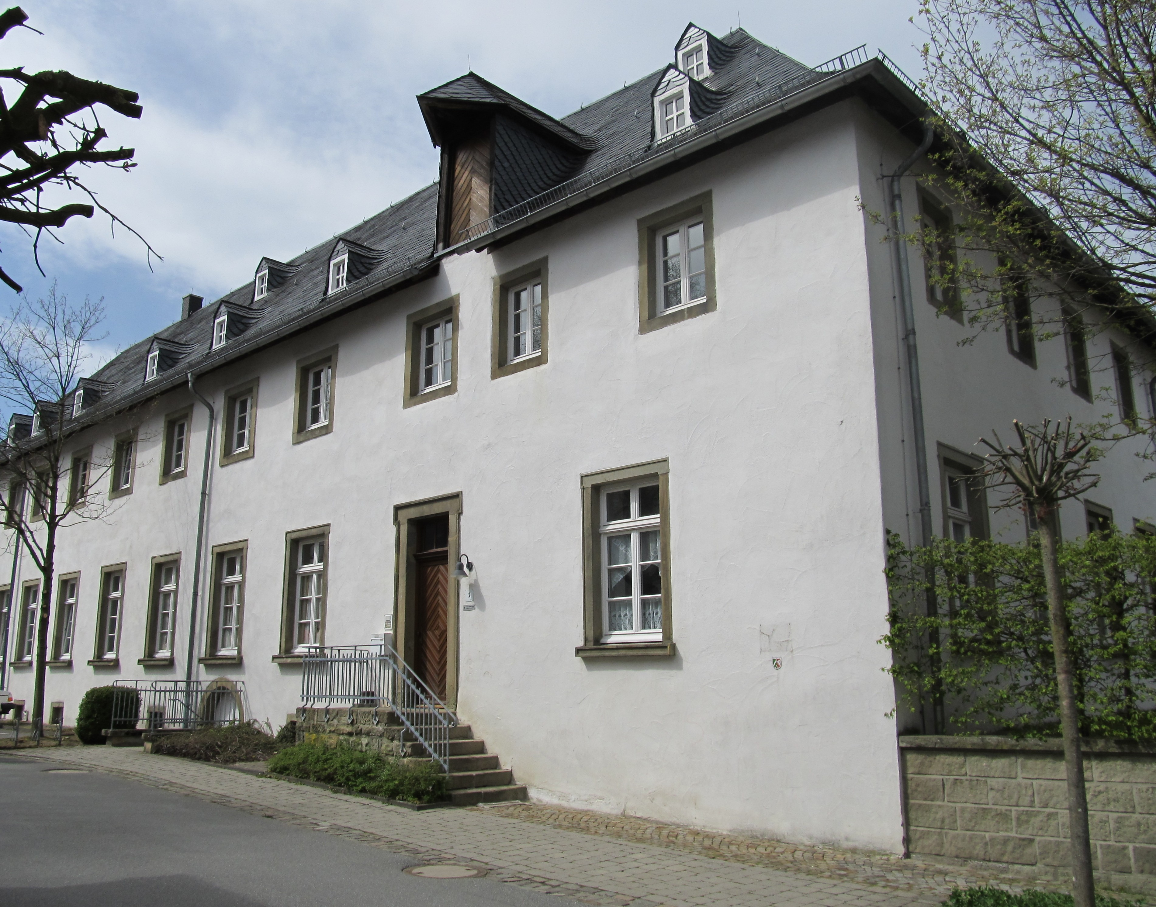 Denkmalgeschütztes ehemaliges Kapuzinerkloster, Rüthen (Deutschland)